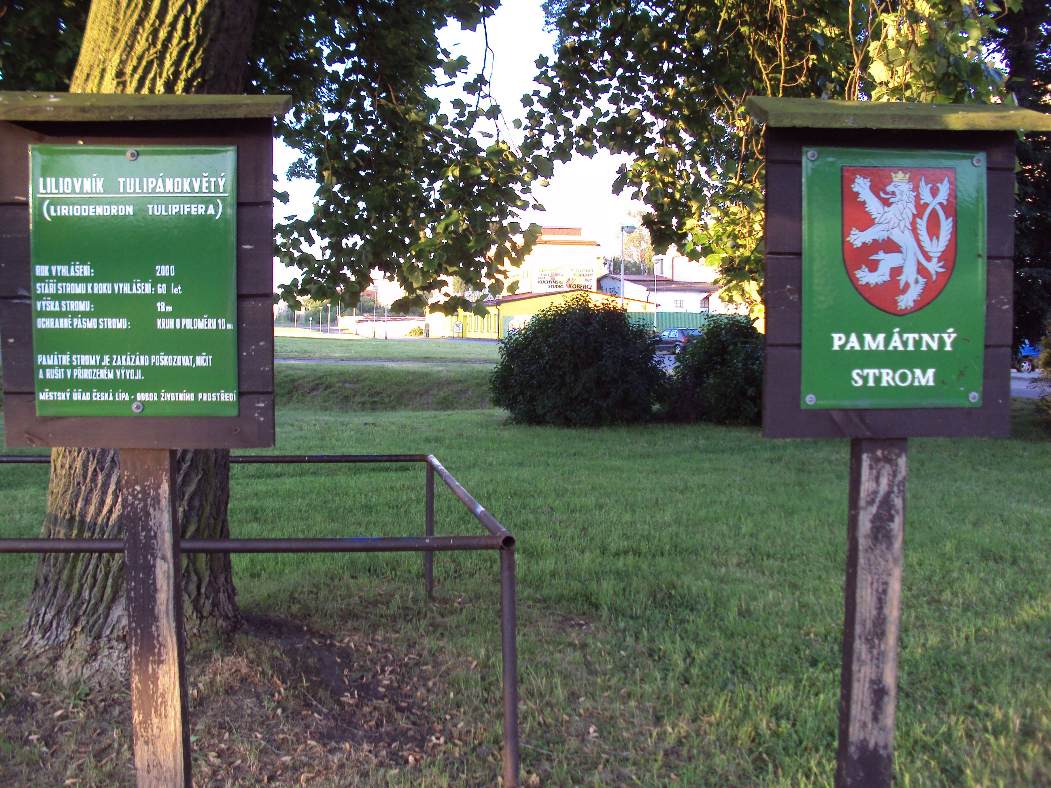 Označení památného stromu u České spořitelny v České Lípě